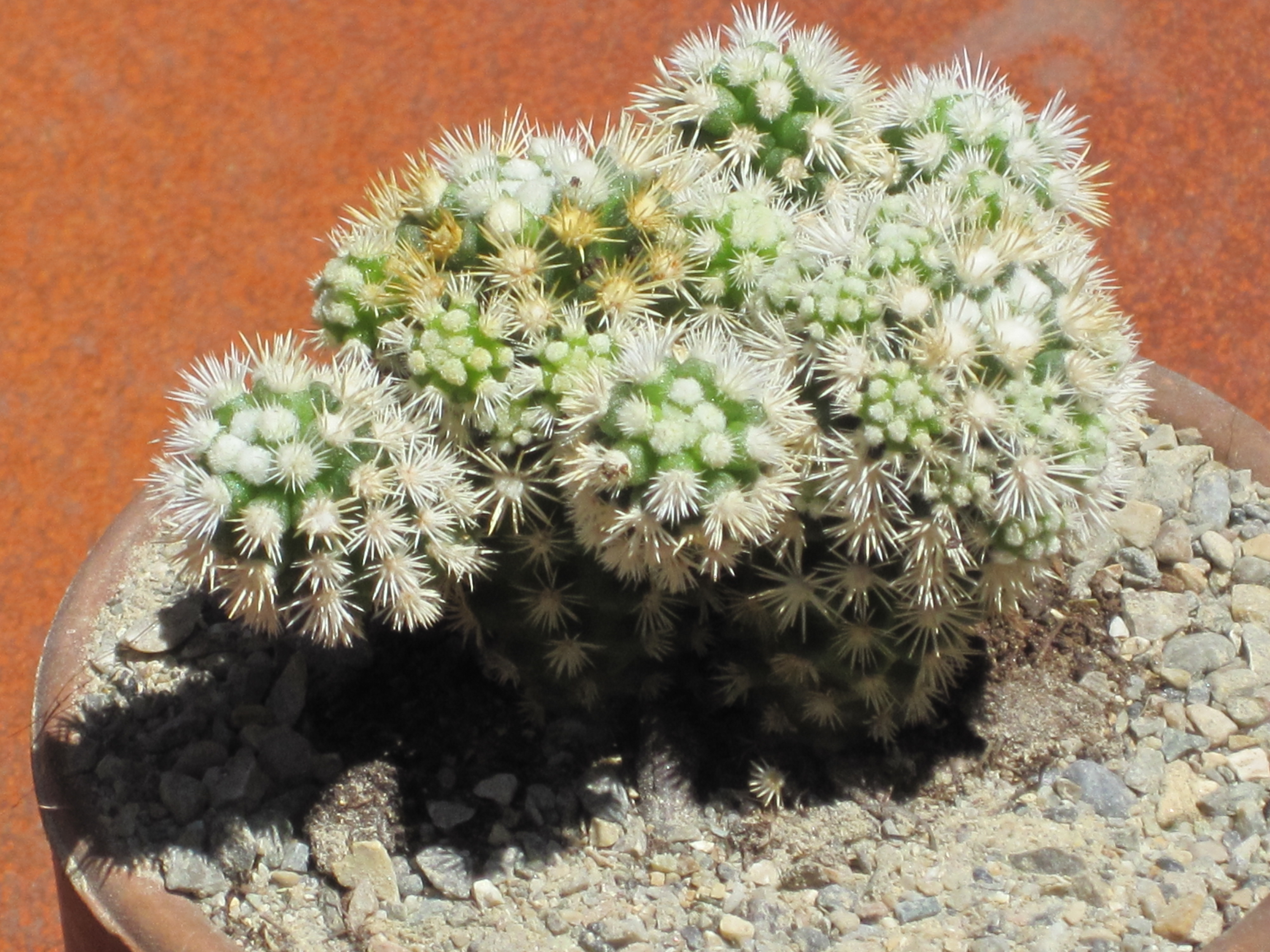 Mammillaria vetula ssp. gracilis cv. Arizona snowcap